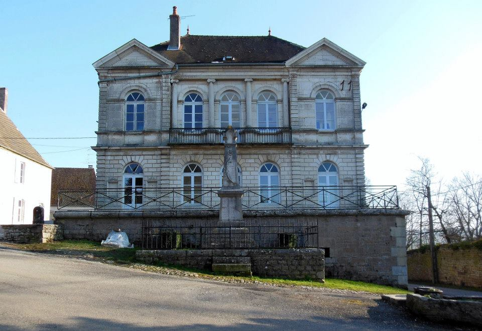 Photographie de la mairie de Montmirey-le-Château (39), Rue de l'Eglise.